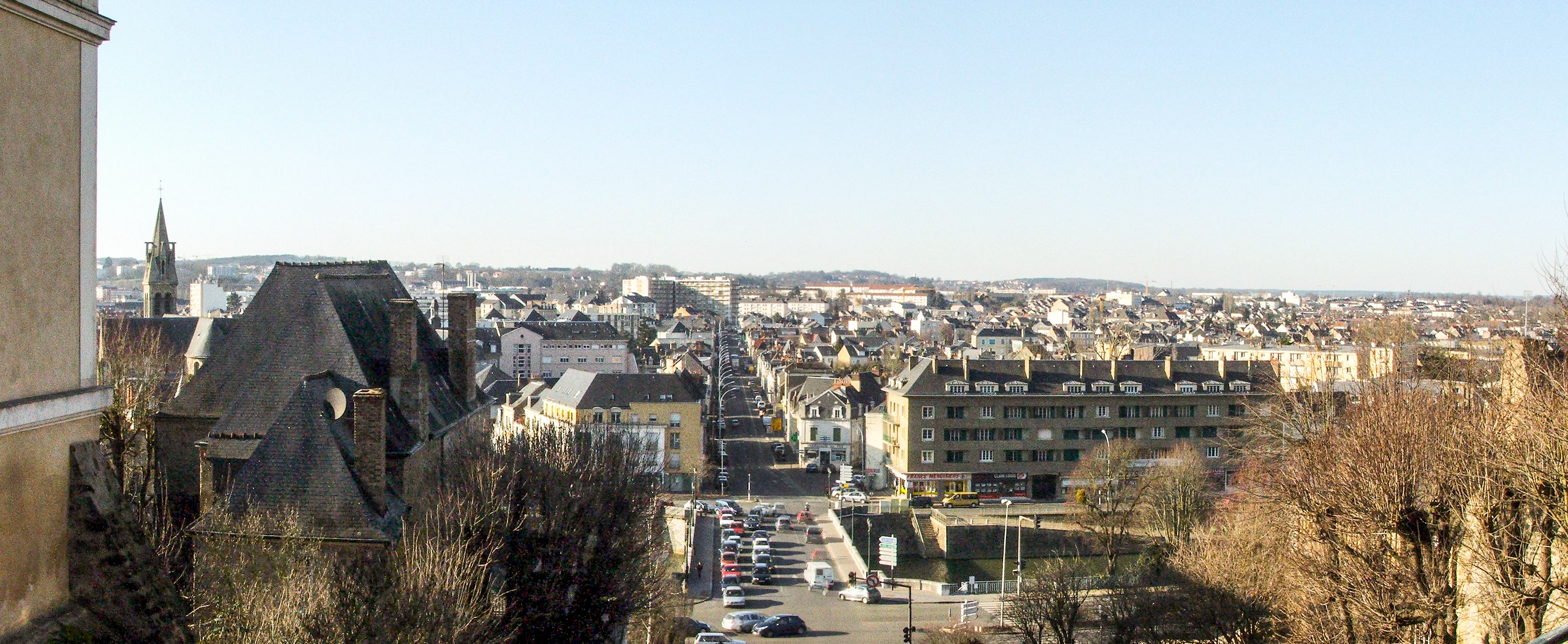 Panorama en direction du nord depuis le tunnel des Jacobins, au centre de la ville du Mans.